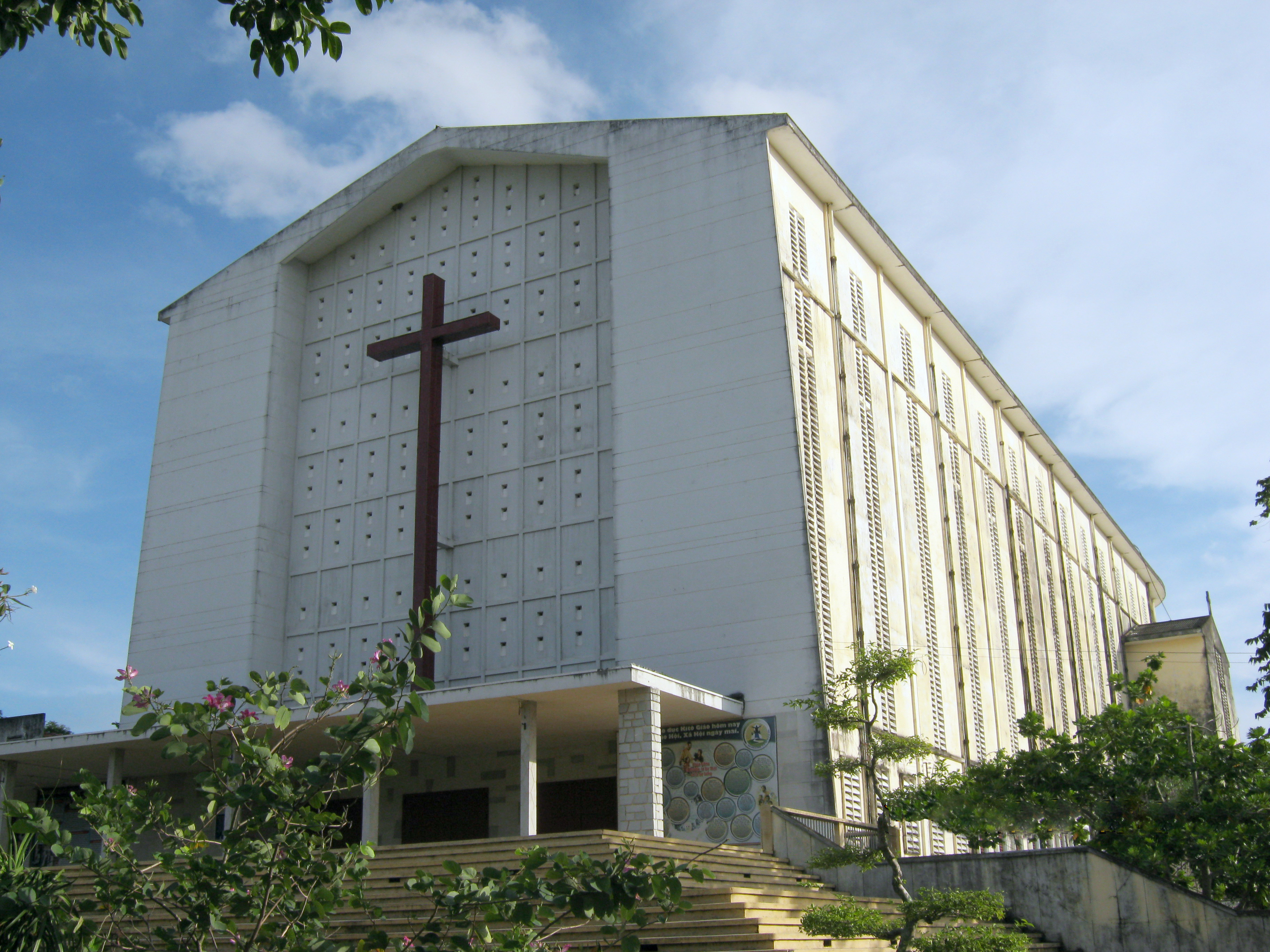 Nhà thờ chánh tòa Vĩnh Long.